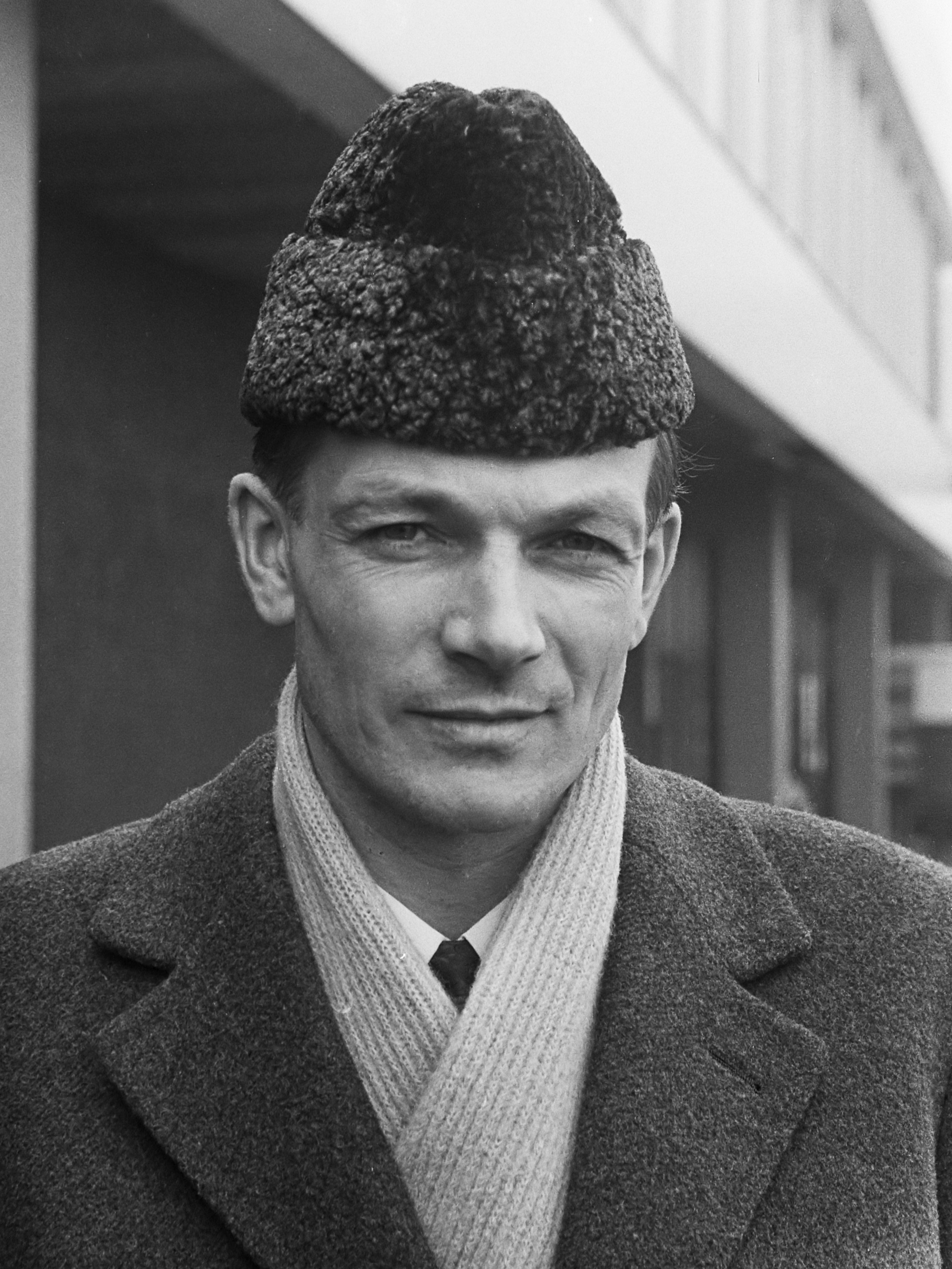 Aankomst van het voetbalelftal van Vorwärts Berlin op Schiphol, trainer Hans-Georg Kiupel 8 maart 1971